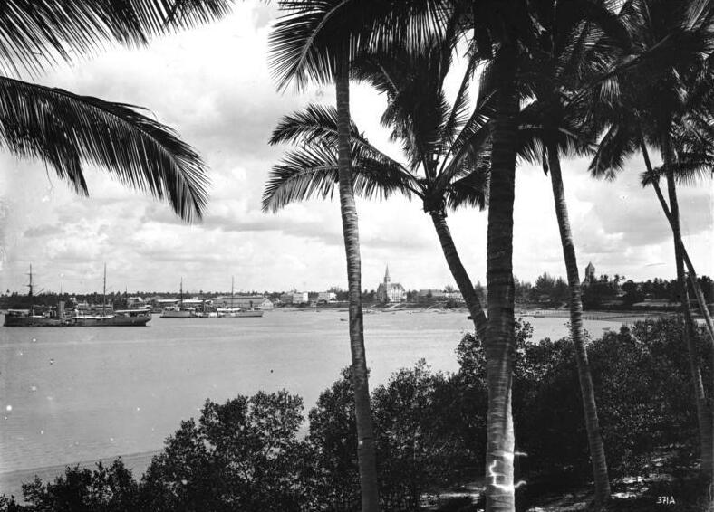 Daressalam, Hafen Panorama